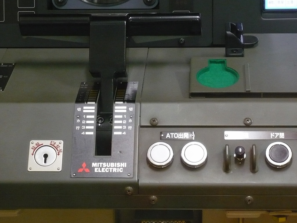 東京地下鉄10000系のマスコンハンドル